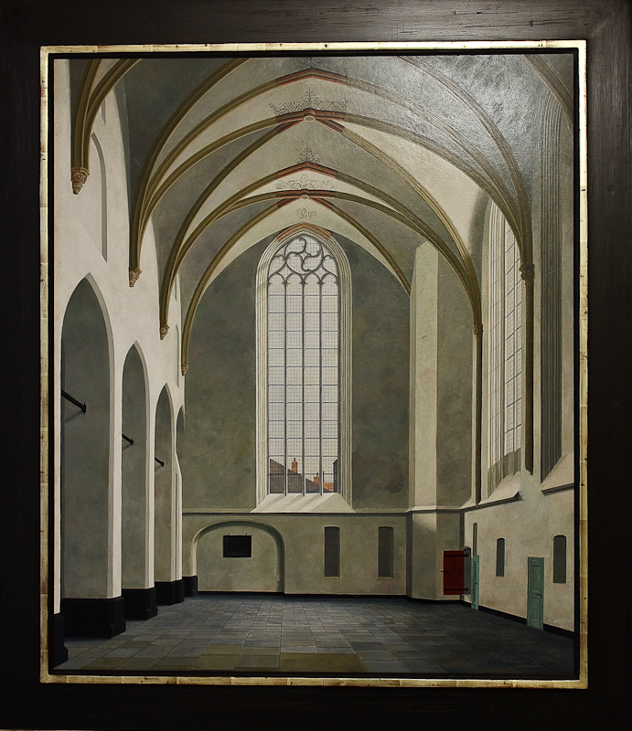 Henk Helmantel Kerkinterieur 1970 olieverf op paneel Hoog wit gewelf met geopend rood deurtje rechts Henk Helmantel Church interior 1970 oil on panel High white arch with open red door on the right